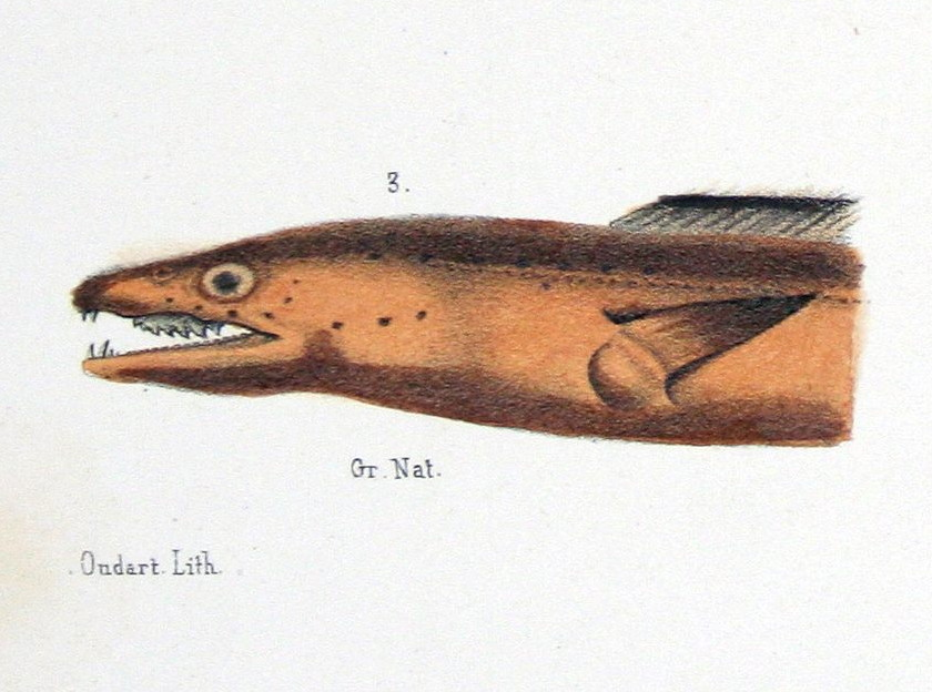 Conger limbatus = Cynoponticus savanna